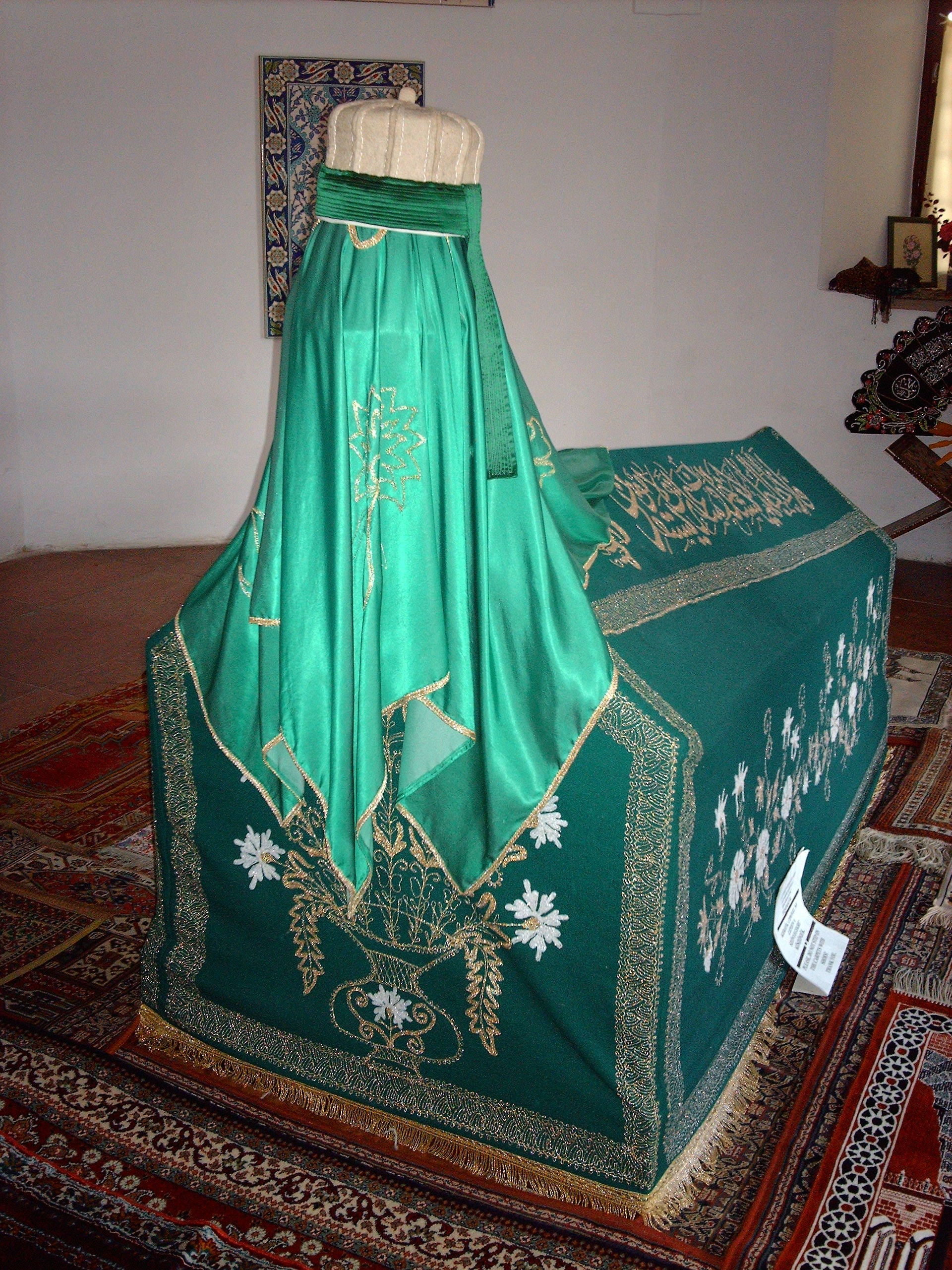 Die Türbe von Gül Baba in Budapest (Ungarn).